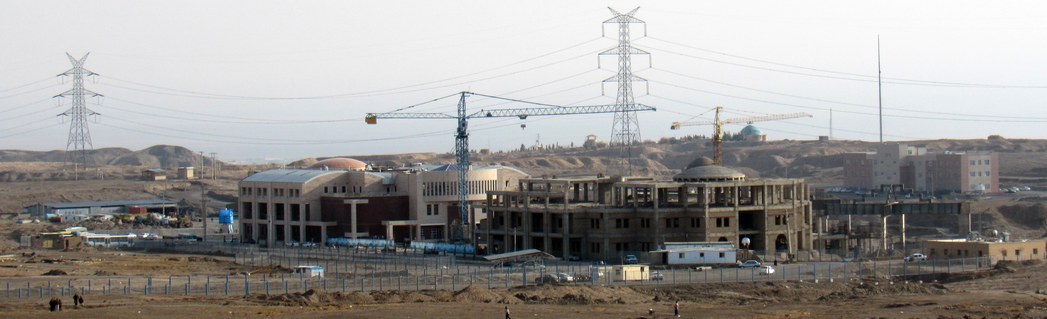 پردیس دانشگاه علوم پزشکی سبزوار- در حال ساخت